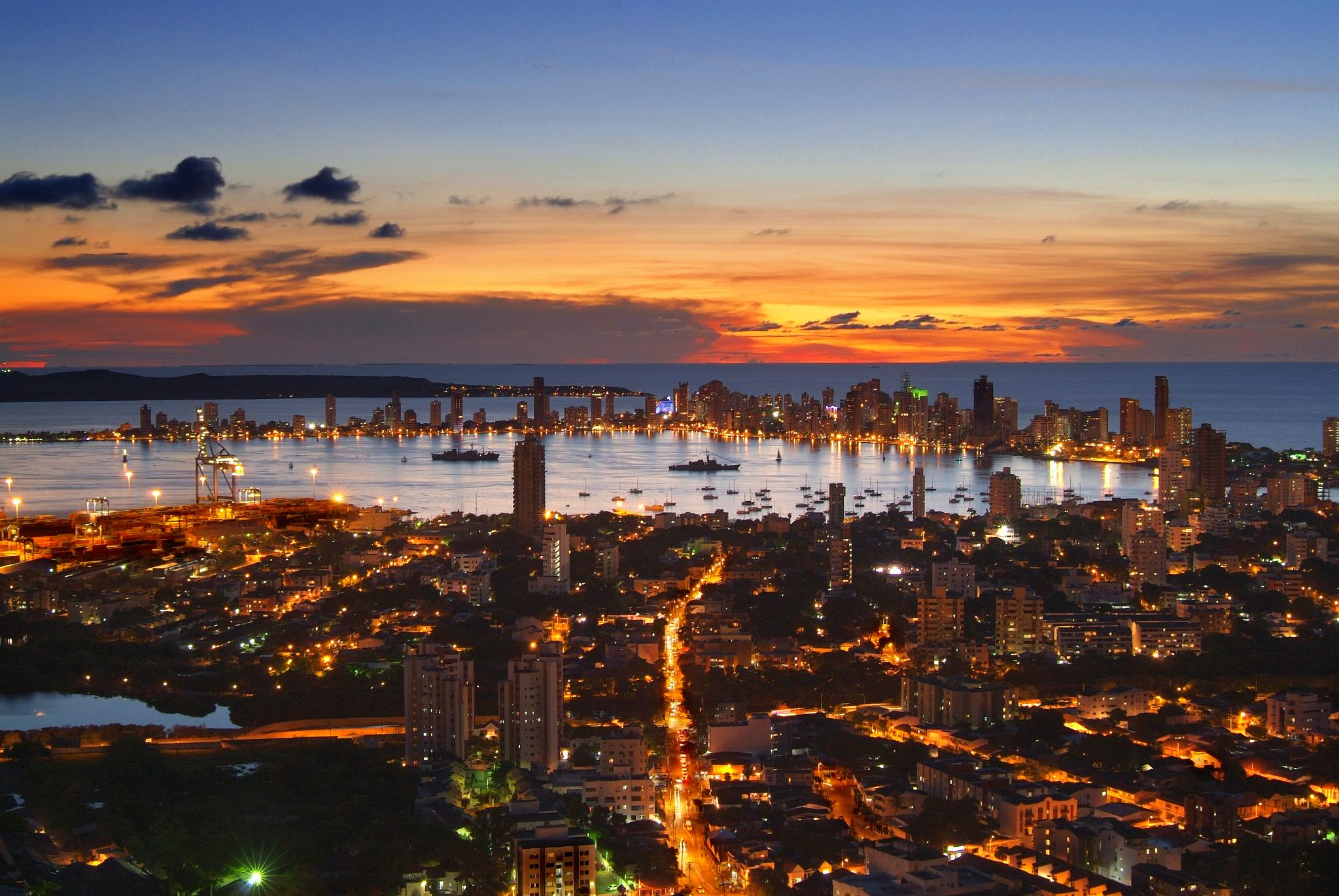 Atardecer en la bahia de Cartagena de Indias, Colombia. Vista desde el Cerro La Popa.